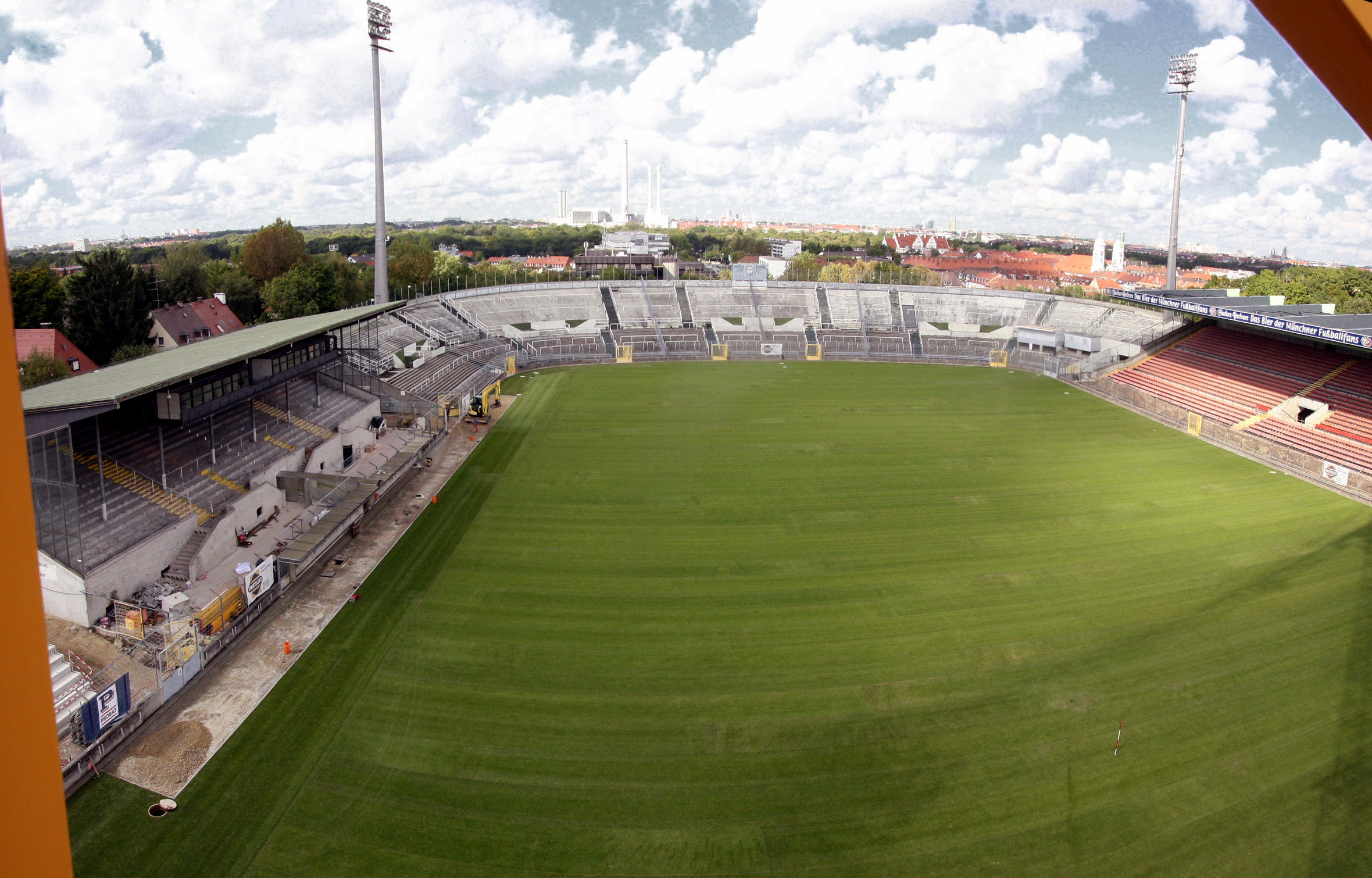 Die Baustelle: Das Städtische Stadion an der Grünwalder Straße (kurz: Grünwalder Stadion) - oder auch nur Sechzger-Stadion genannt. Hier mit dem wenige Tage vorher neu verlegten (niederbayerischem) Rasen. (Kombination aus 2 Einzelaufnahmen)